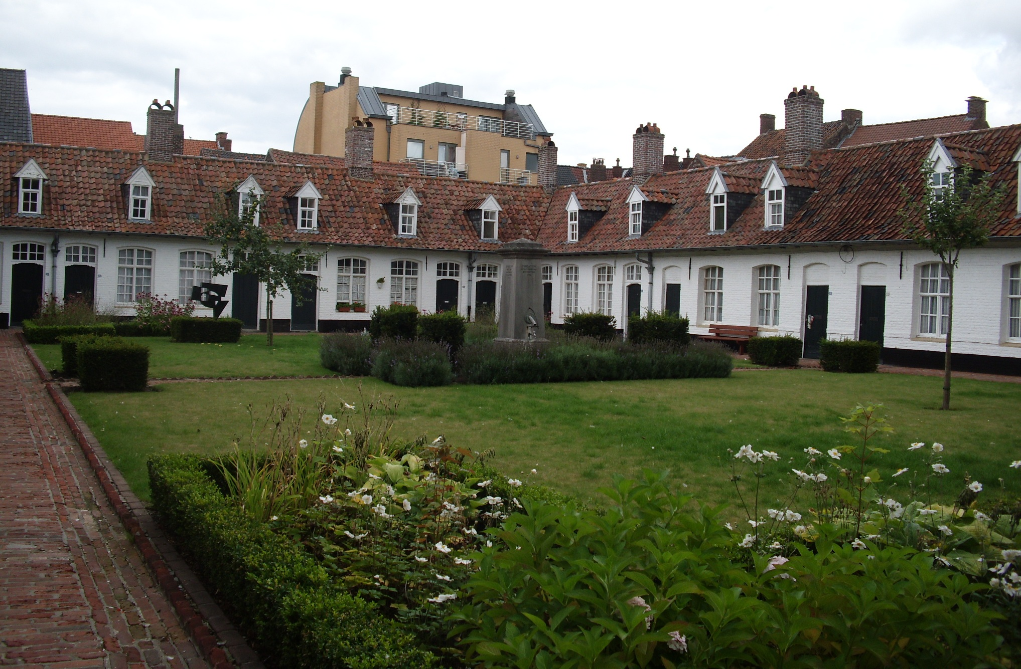 't Weeuwhof - Sint-Annastraat - Poperinge - West-Vlaanderen - Vlaanderen - België Deze caritatieve stichting uit 1769 omvatte aanvankelijk twaalf huisjes voor arme weduwen en ongehuwde vrouwen. Ze werd uitgebreid met negen huisjes in 1782 en groeide aan tot ze in totaal 26 huisjes telde. De lage witte huisjes zijn verankerde baksteengebouwen op een gepikte plint en onder een zadeldak. De huisjes staan gegroepeerd rond een rechthoekige binnentuin en hebben een overbouwde ingang aan de Sint-Annastraat. Boven de getoogde toegangspoort staat een nis met een houten beeld van Sint-Anna. Op het plein bevindt zich een classicistische arduinen waterpomp tussen gesnoeide taxusboompjes. Tussen 1975 en 1978 werden de huisjes gesaneerd en werd het interieur uitgebreid door samenvoeging van twee woningen tot één of door een uitbouw achteraan. Thans worden de resterende 19 woningen bewoond door minder gegoeden, alleenstaande vrouwen en bejaarde echtparen.